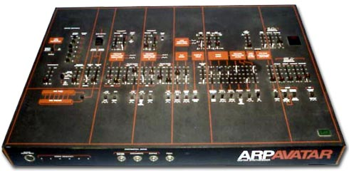 sintetizzatore ARP Avatar Licensing Categoria:Sintetizzatori Categoria:Sintetizzatori ARP